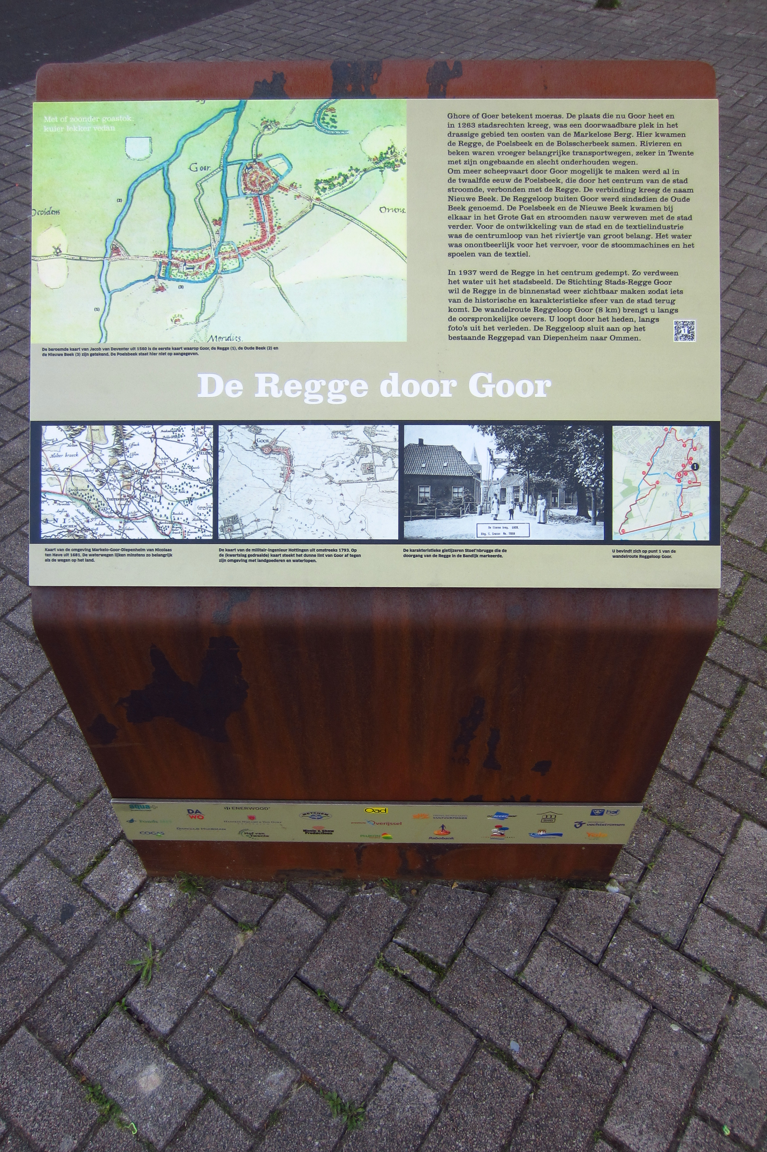 Informatiebord 'De Regge door Goor' (voor politiebureau, achter gemeentehuis Hof van Twente)